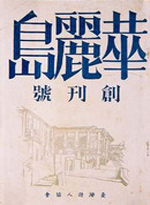 台灣日治時期「台灣詩人協會」之機關雜誌。